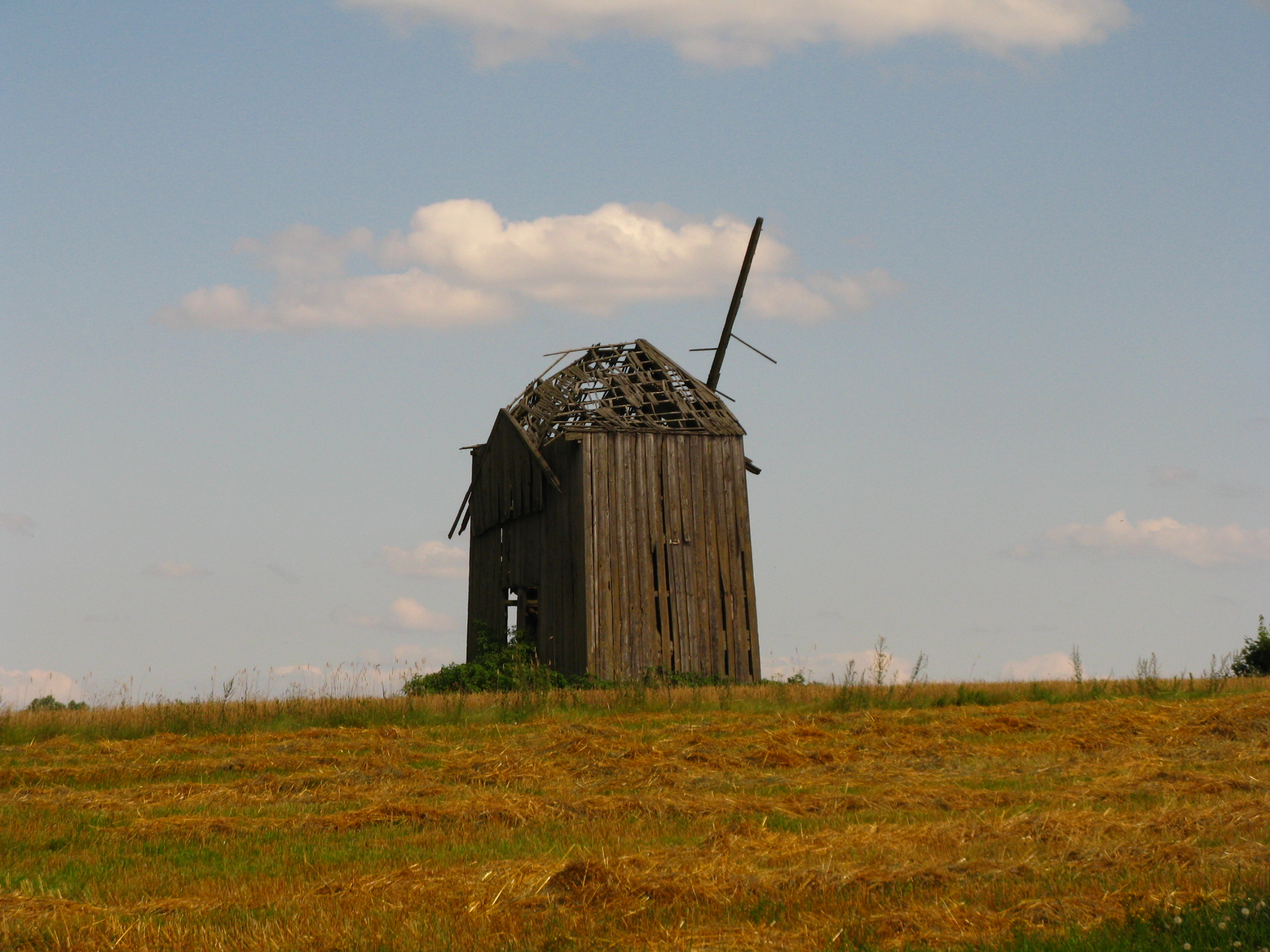 Česky: Větrný mlýn ve východopolské obci Malawicze Górne